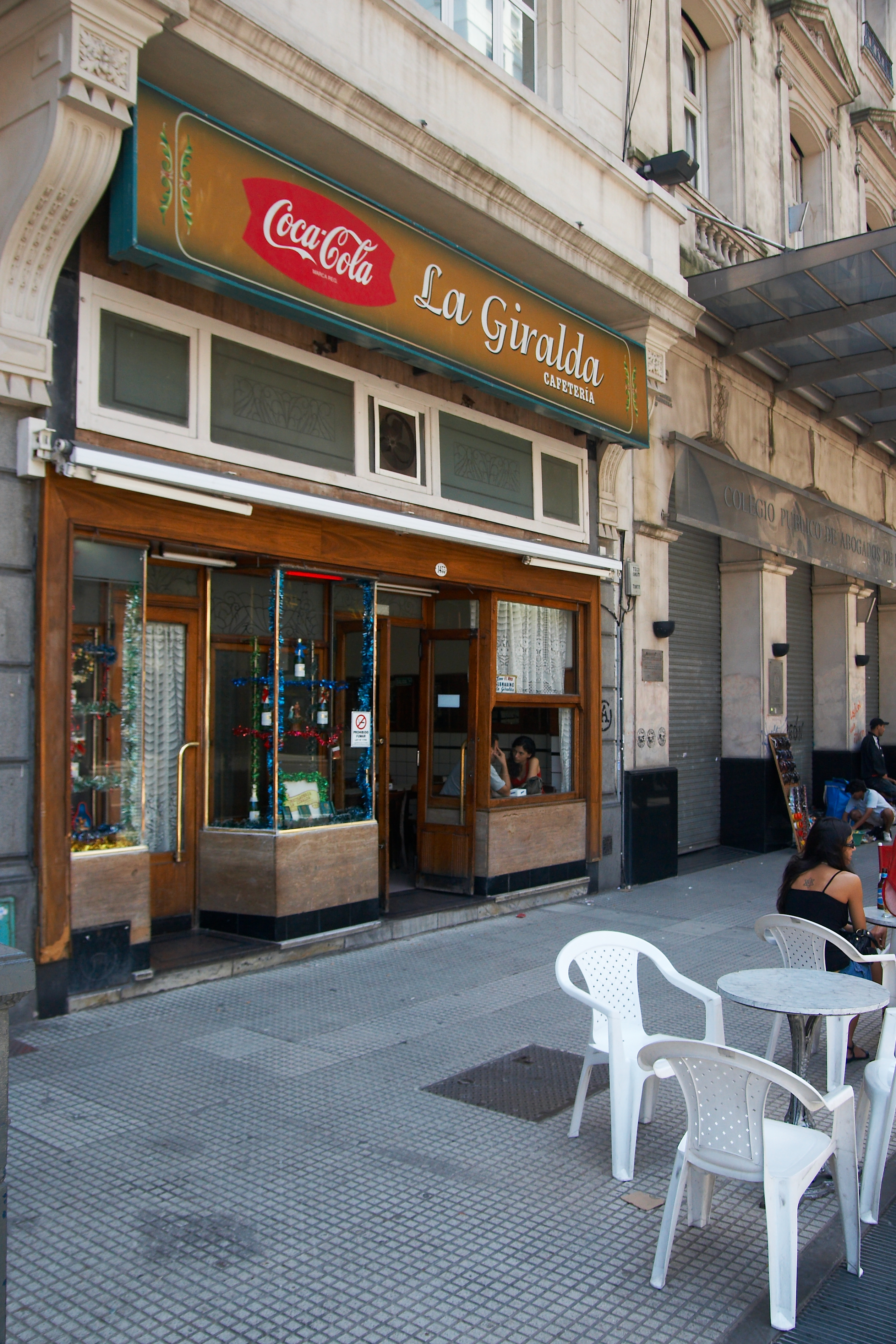 Café La Giralda, Avenida Corrientes 1453, barrio de San Nicolás, Buenos Aires, Argentina.